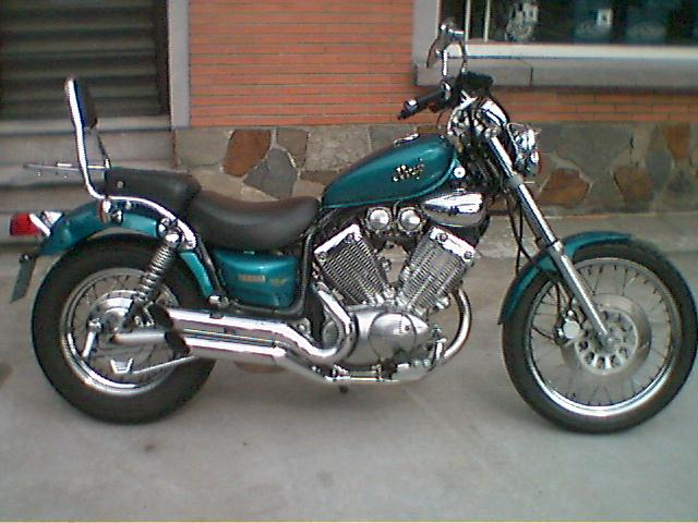 Yamaha Virago 535 azure blue